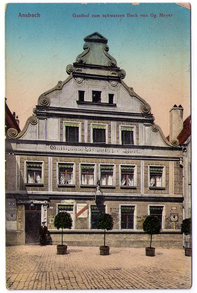 Darstellung der barockisierten Front